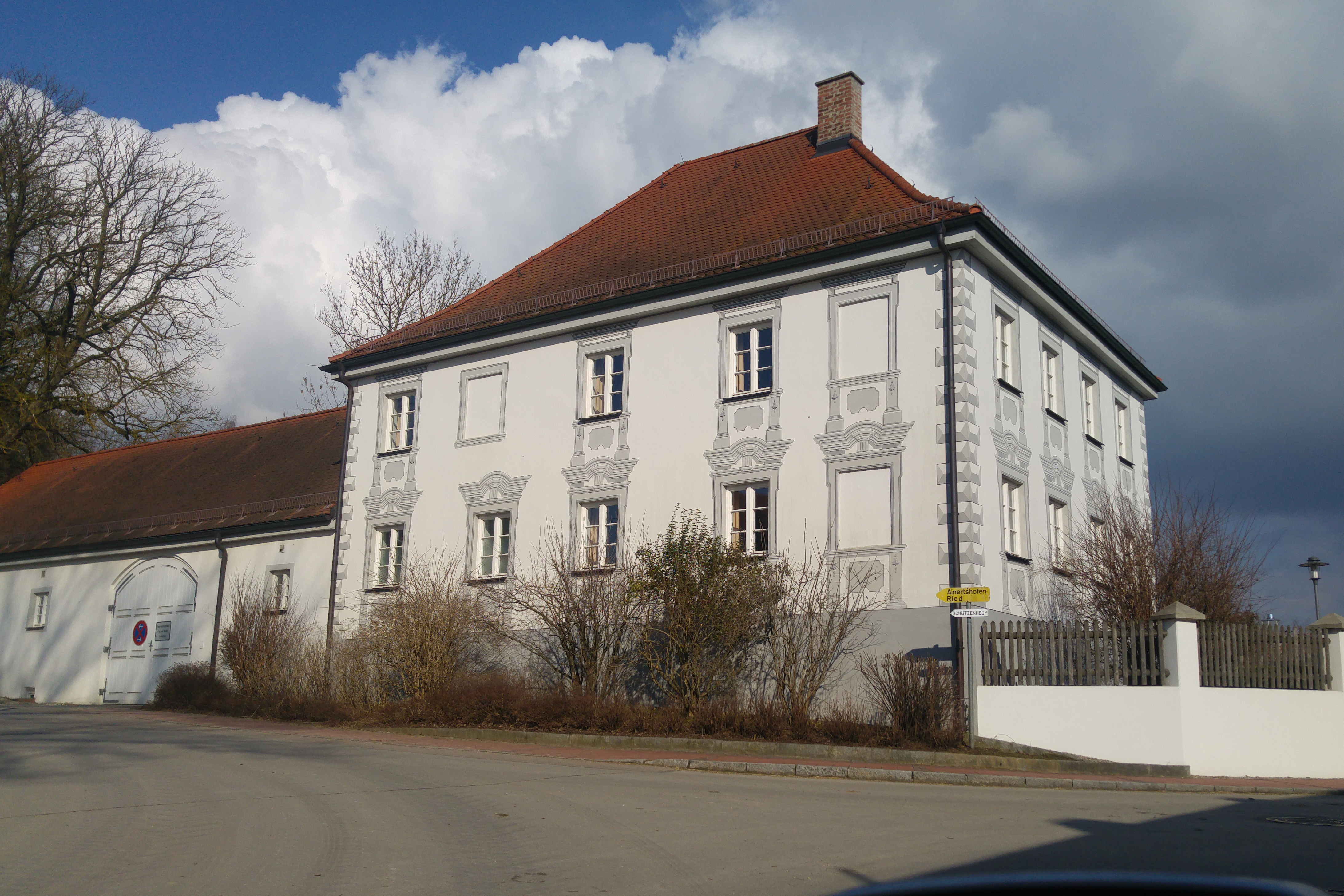 Baudenkmäler in Inchenhofen Aktennr. D-7-71-141-17